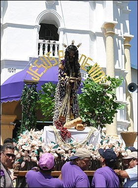 Peregrinos en la celebracion del nazareno